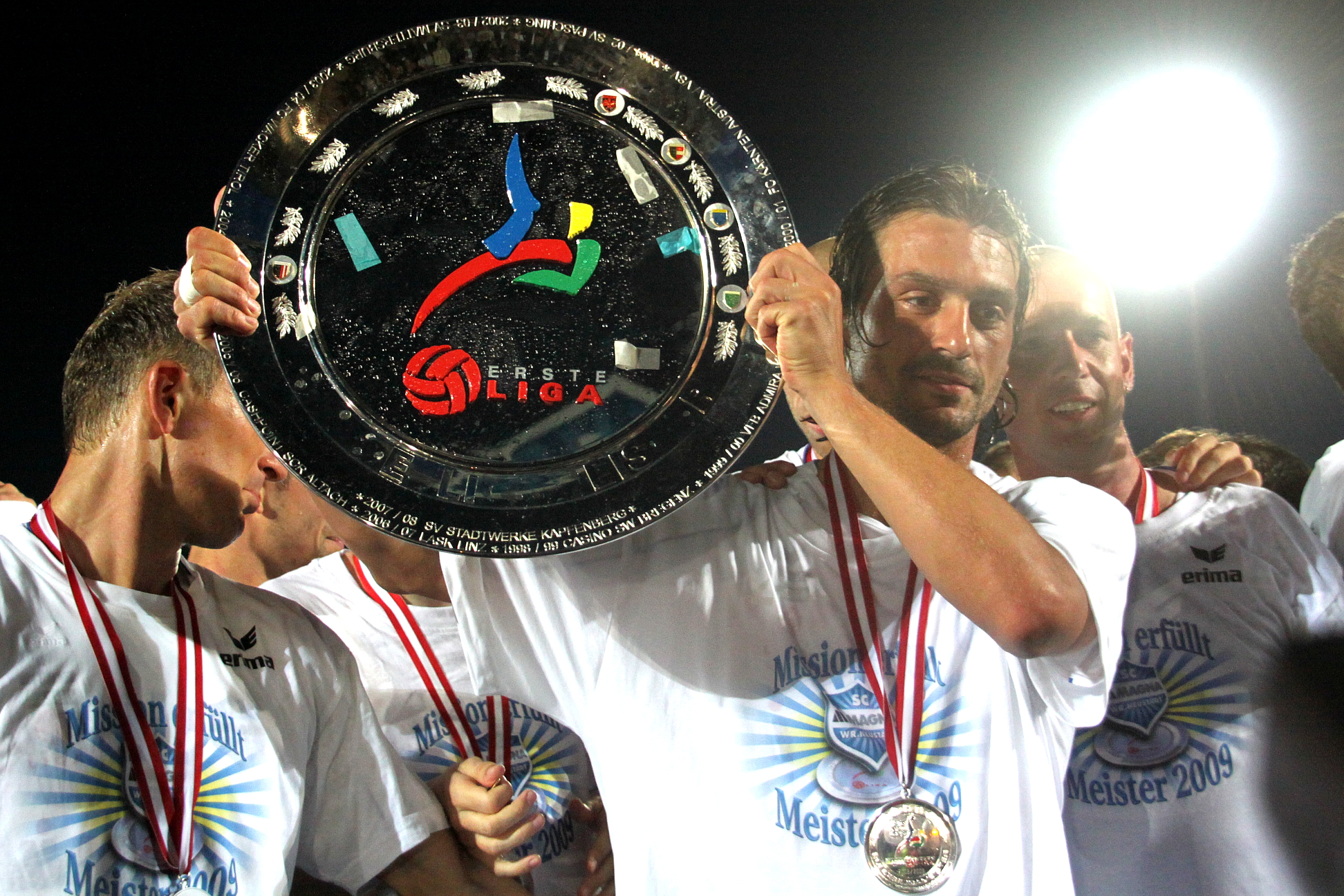 Sanel Kuljic, Mannschaftskapitän des SC Magna Wiener Neustadt mit dem Meisterteller der Ersten Liga 2008-09